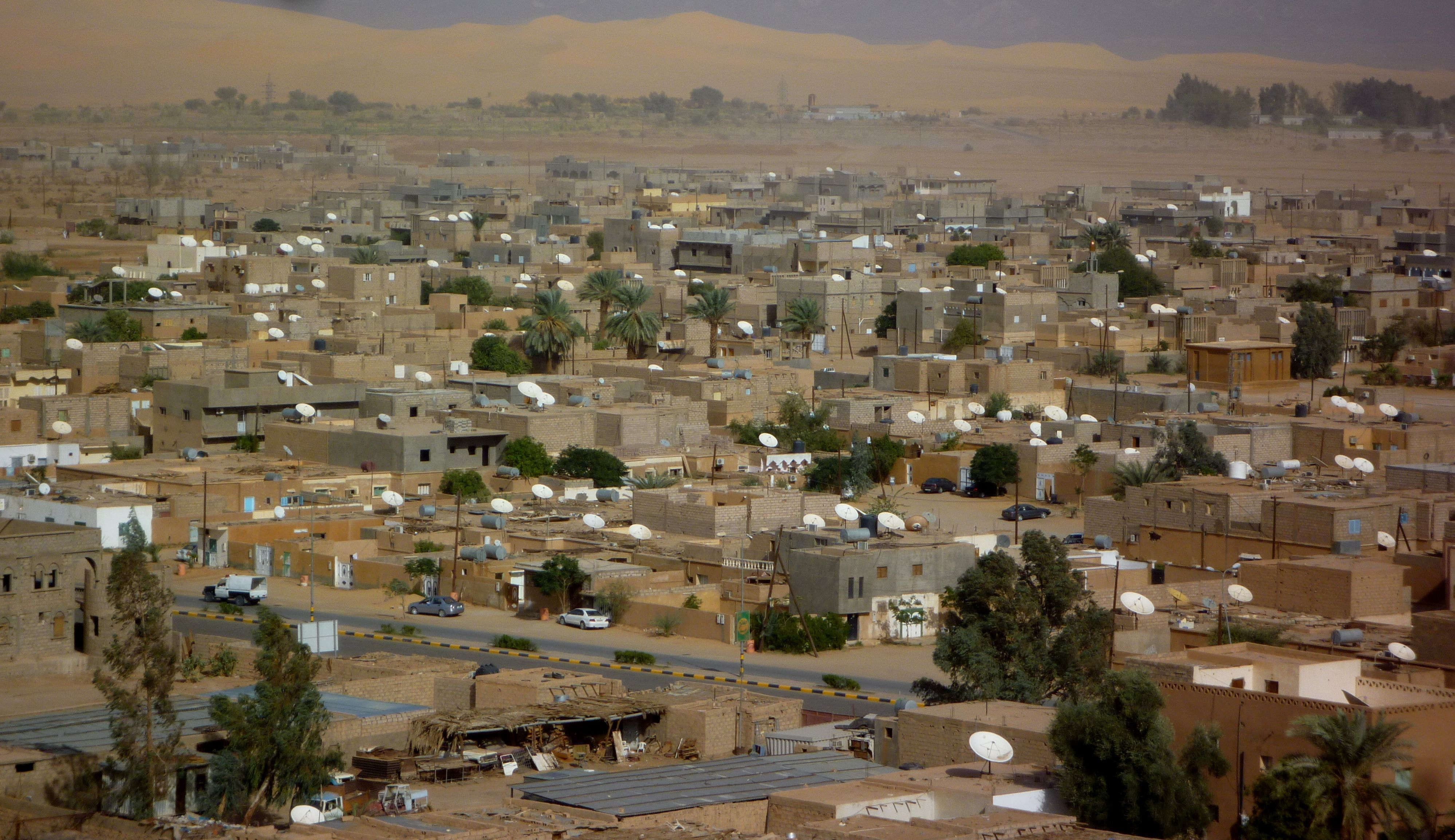 Ghat - Sicht von der Festung02